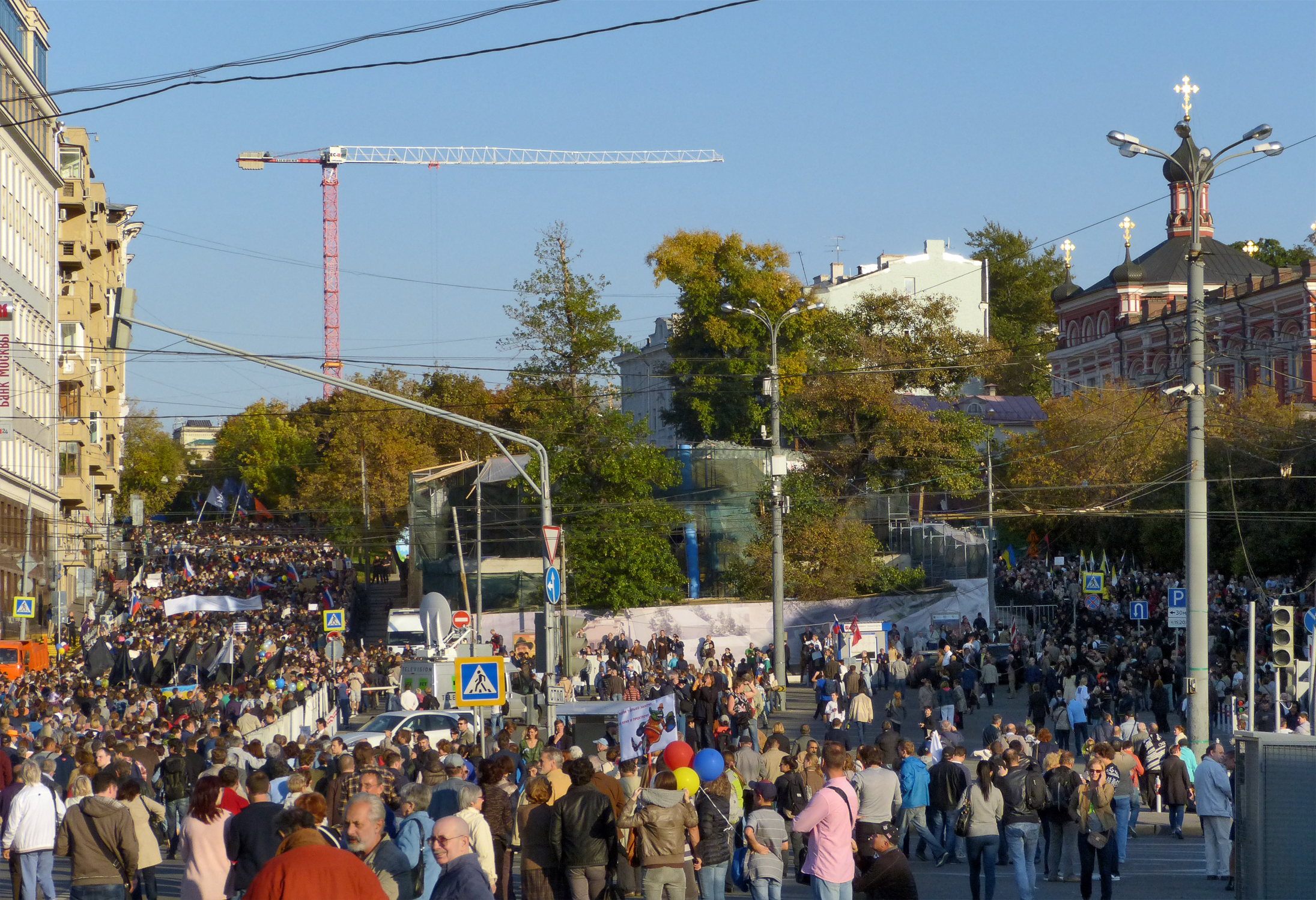 Общероссийский марш мира против вторжения путинских войск на Украину. Москва, Бульварное кольцо, Рождественский бульвар, 21 сентября 2014 года.